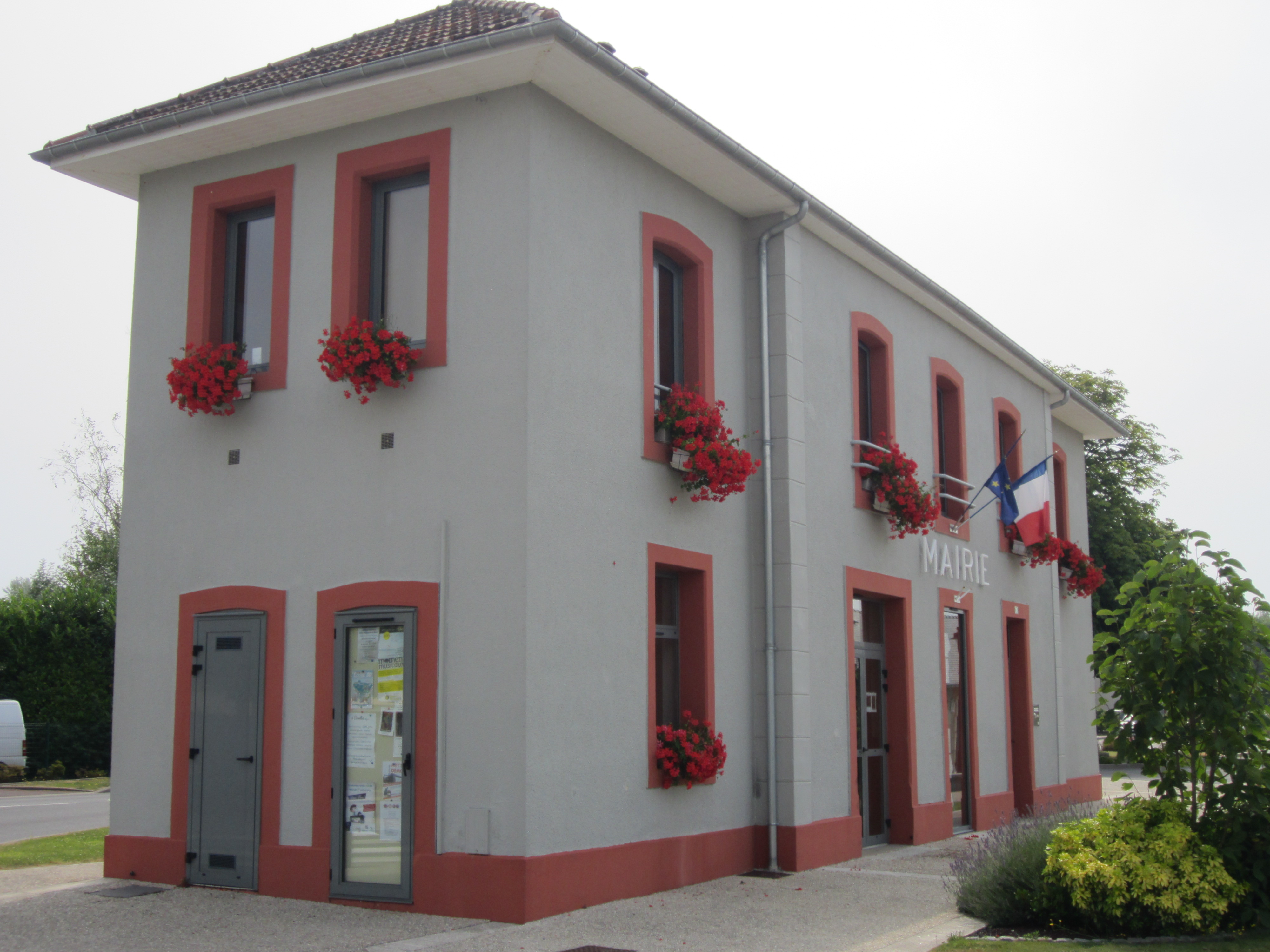 Mairie de Carolles, Manche